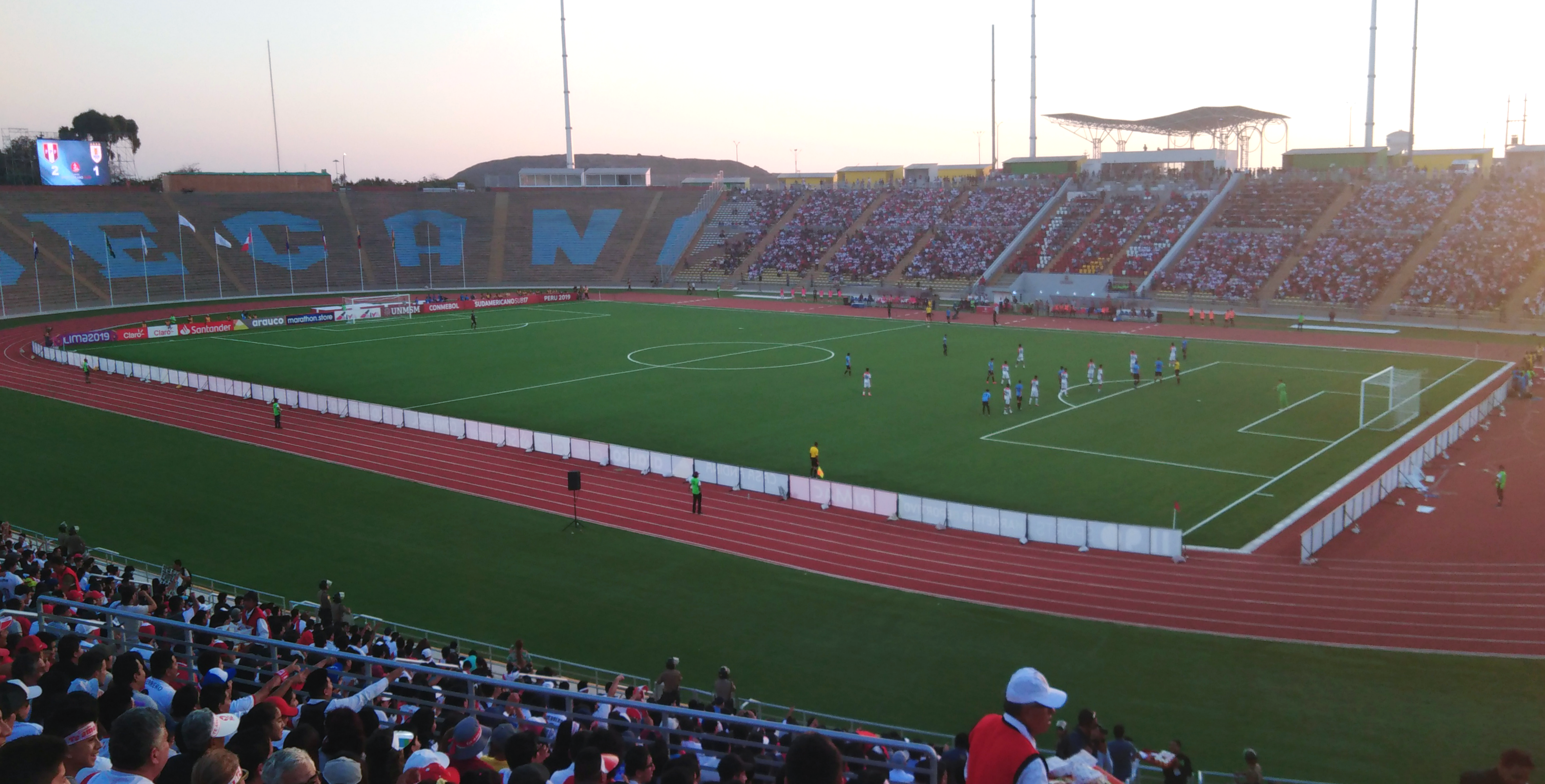 UNMSM Estadio San Marcos - 2019